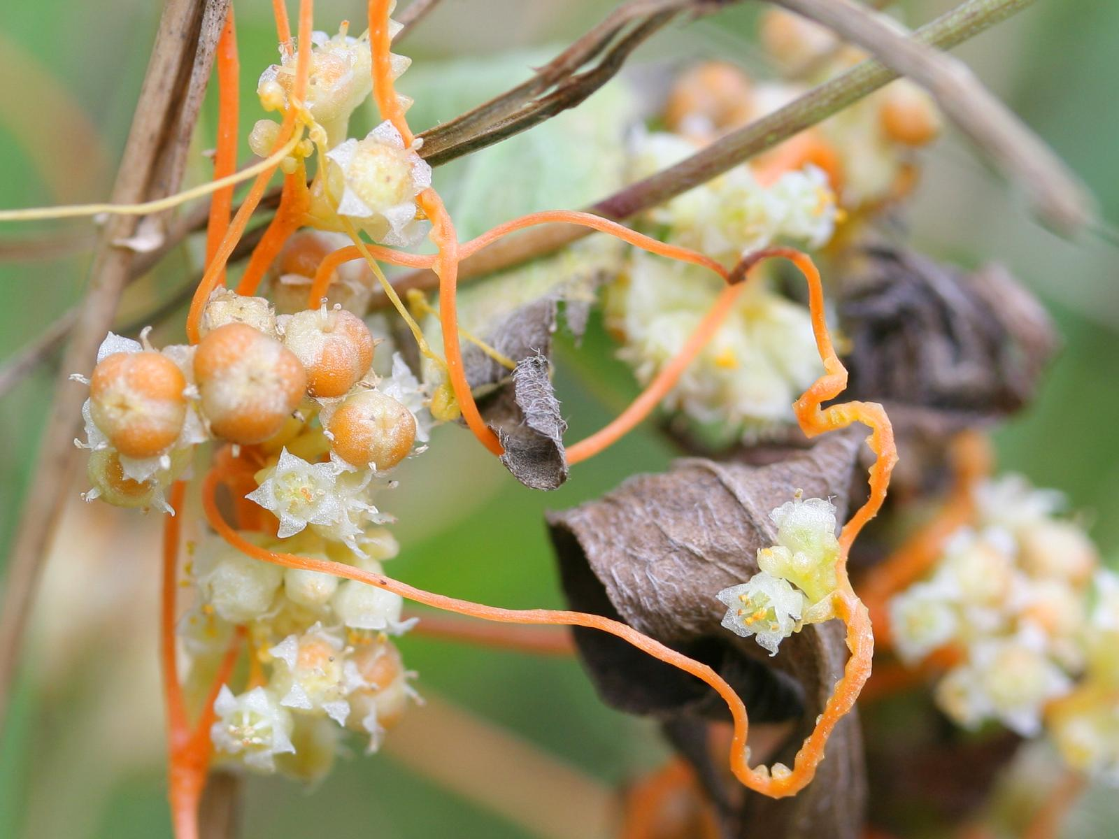 Nordamerikanische Seide (Cuscuta campestris)